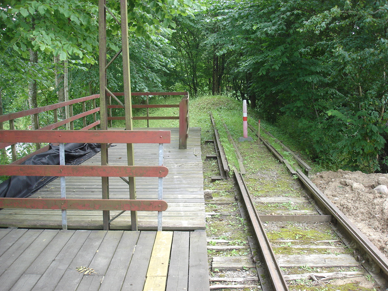 Sporvejsmuseets afløbsspor mod sydøst på Ringsted-Hvalsø-Frederikssund-banens tracé. Til sammenligning med sporvognsskinnerne er her bevaret en lille stump normalspor (1.435 mm)